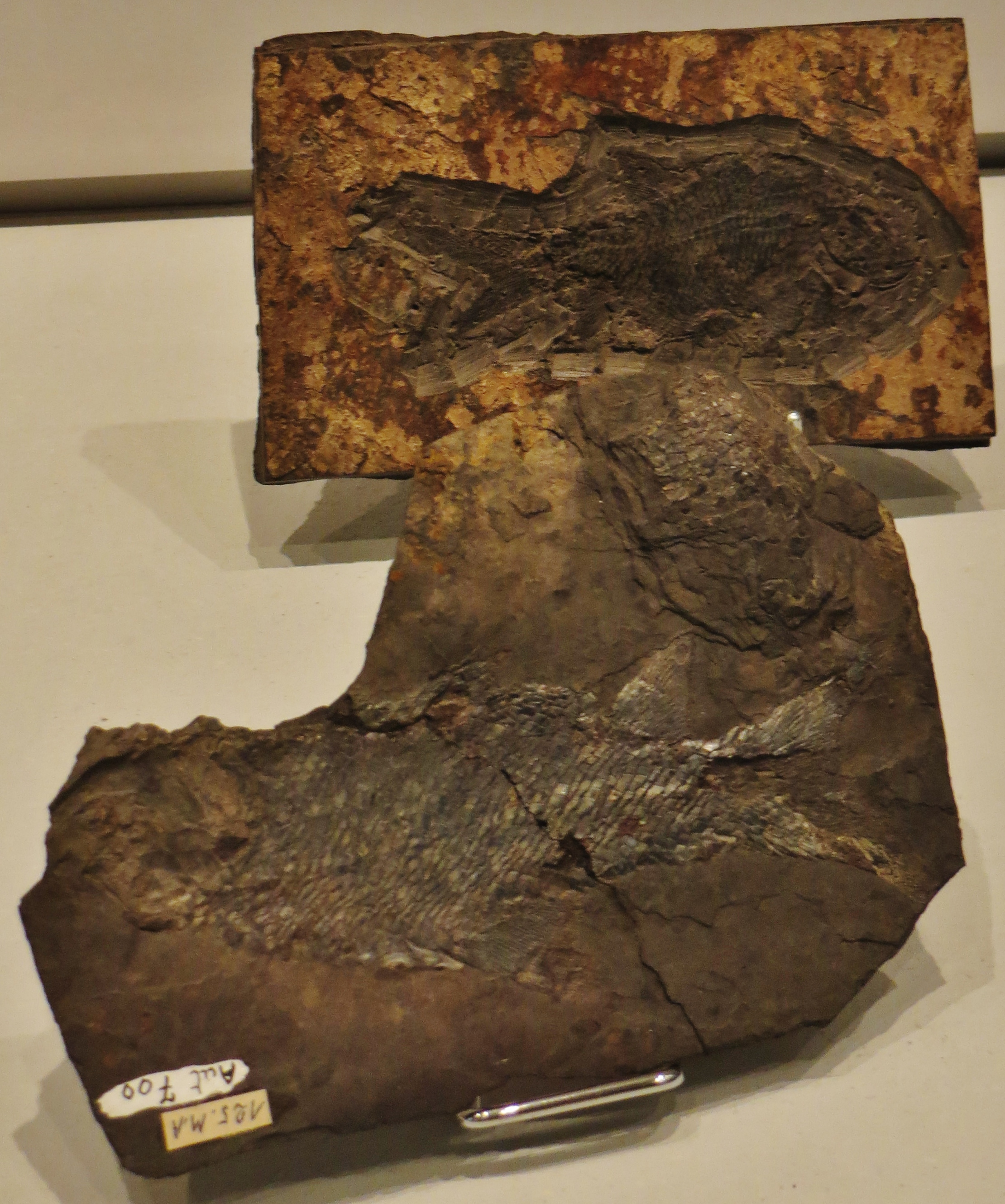 Fossil - Took the picture at Museum of Natural History, Autun